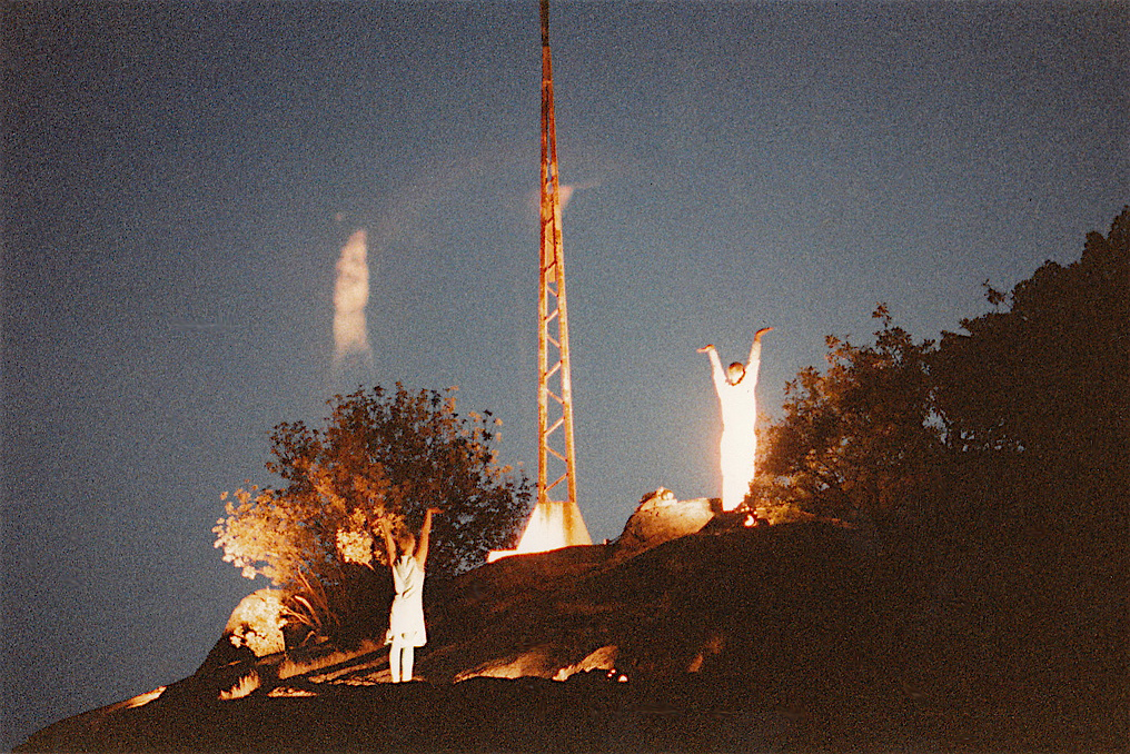 Riss Dansekompani Kapteinen